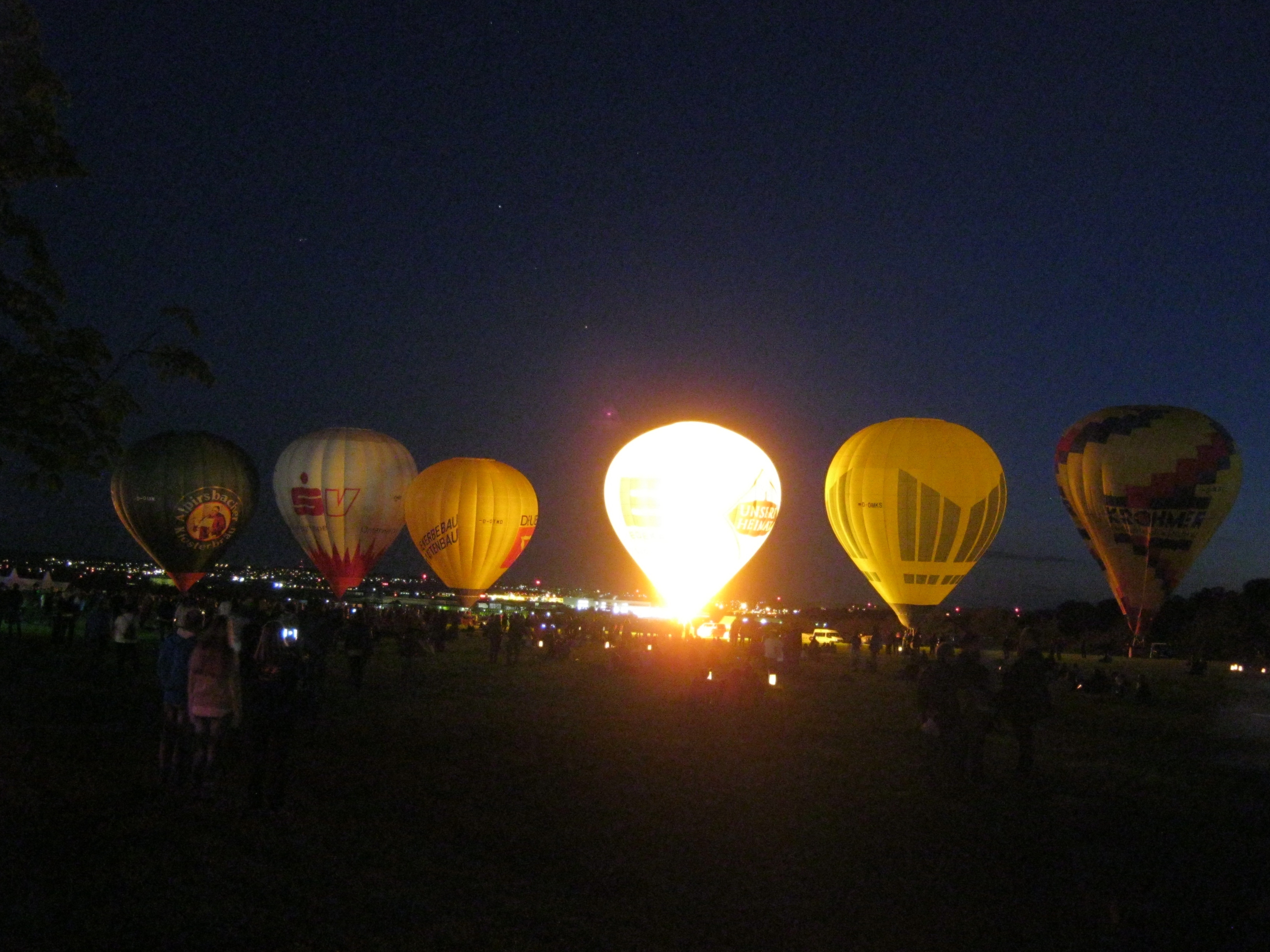 Ballonglühen auf den "Flammenden Sternen" am Abend des 17.8.2014